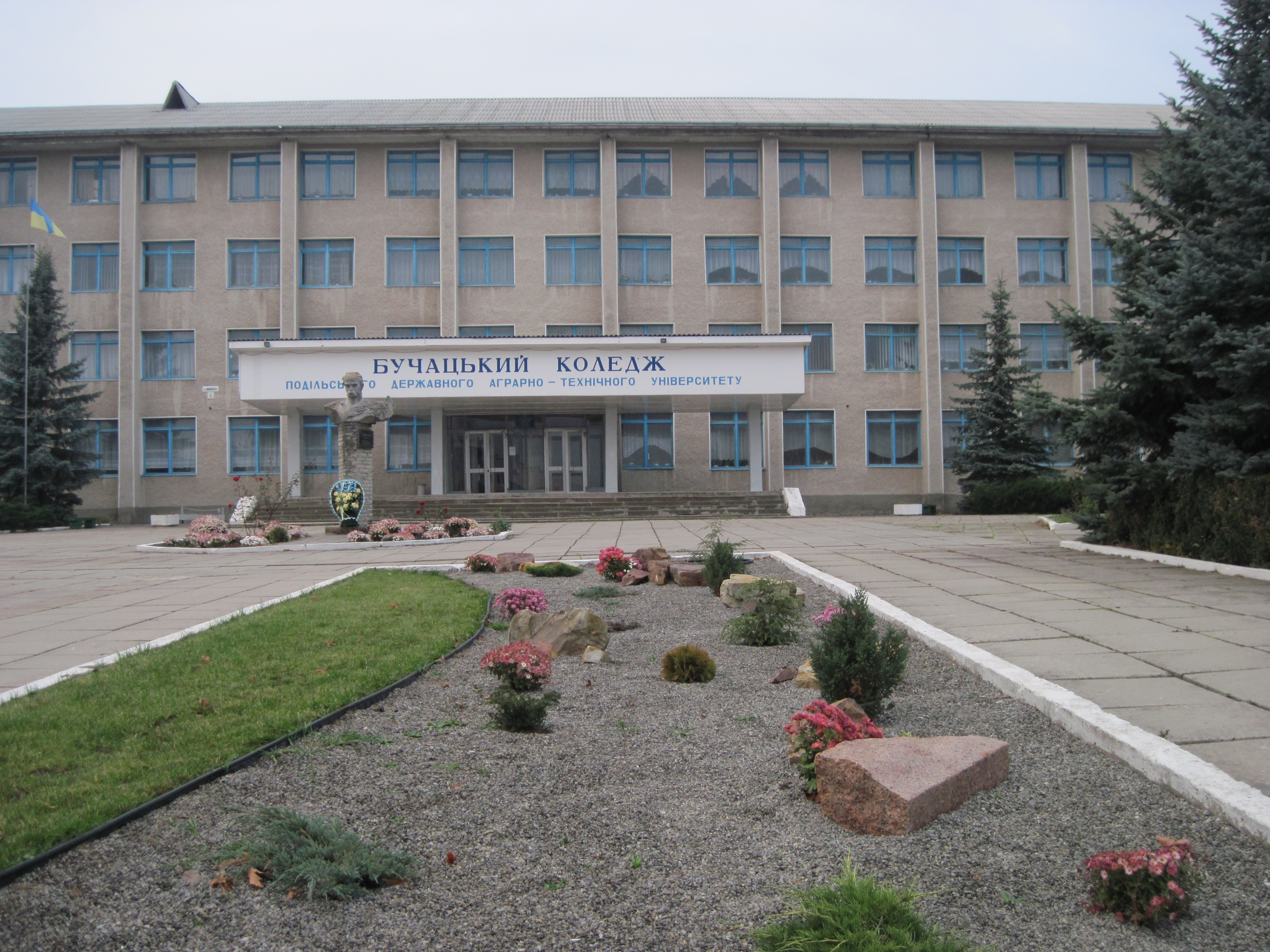 Бучацький аграрний коледж